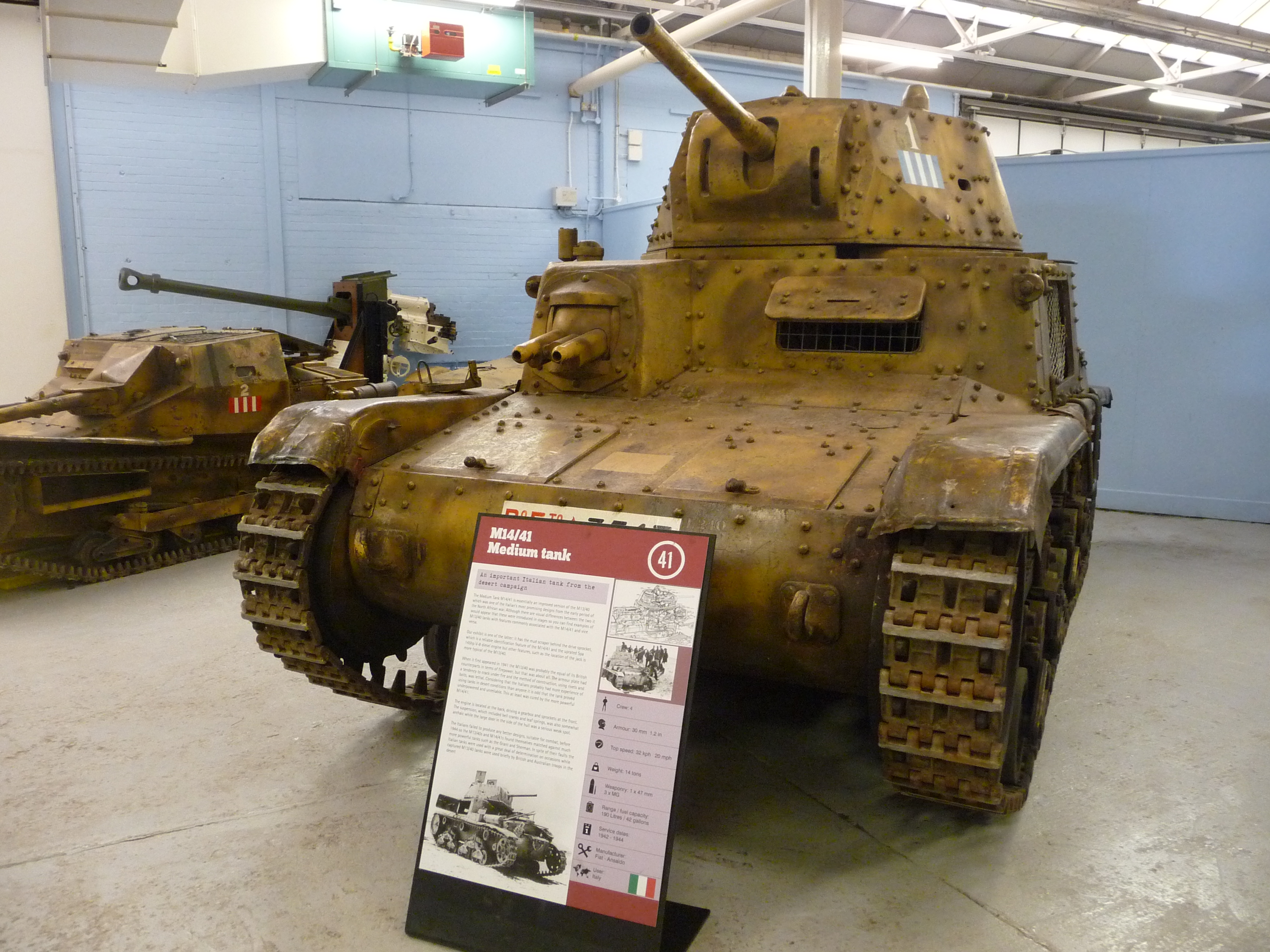 M14/41 Tank Medium